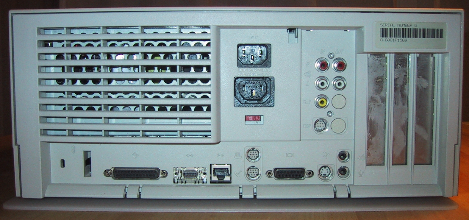 Apple Power PC 7500 100 MHz